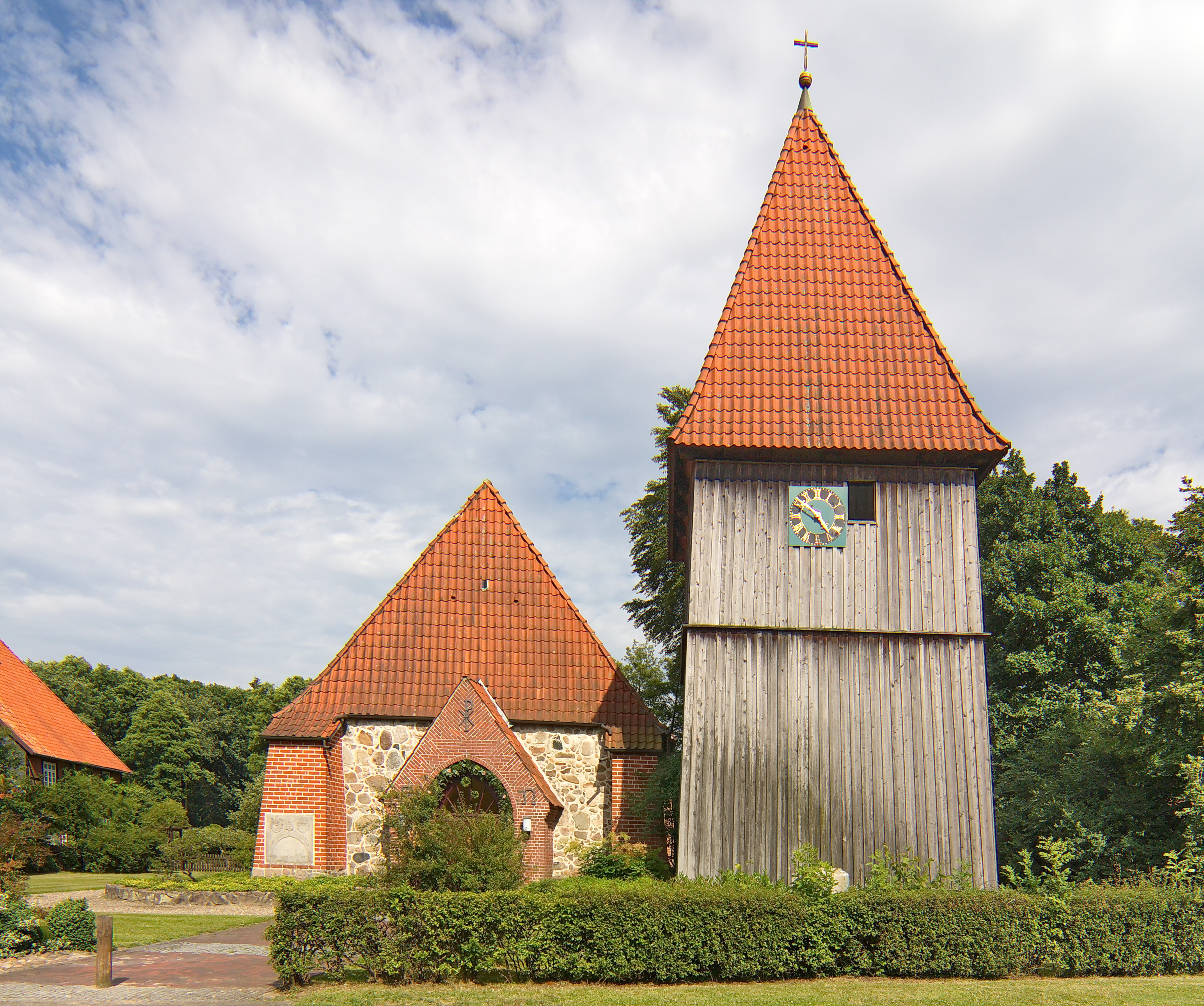 St. Georgs-Kirche (Steinhorst), Niedersachsen, Deutschland